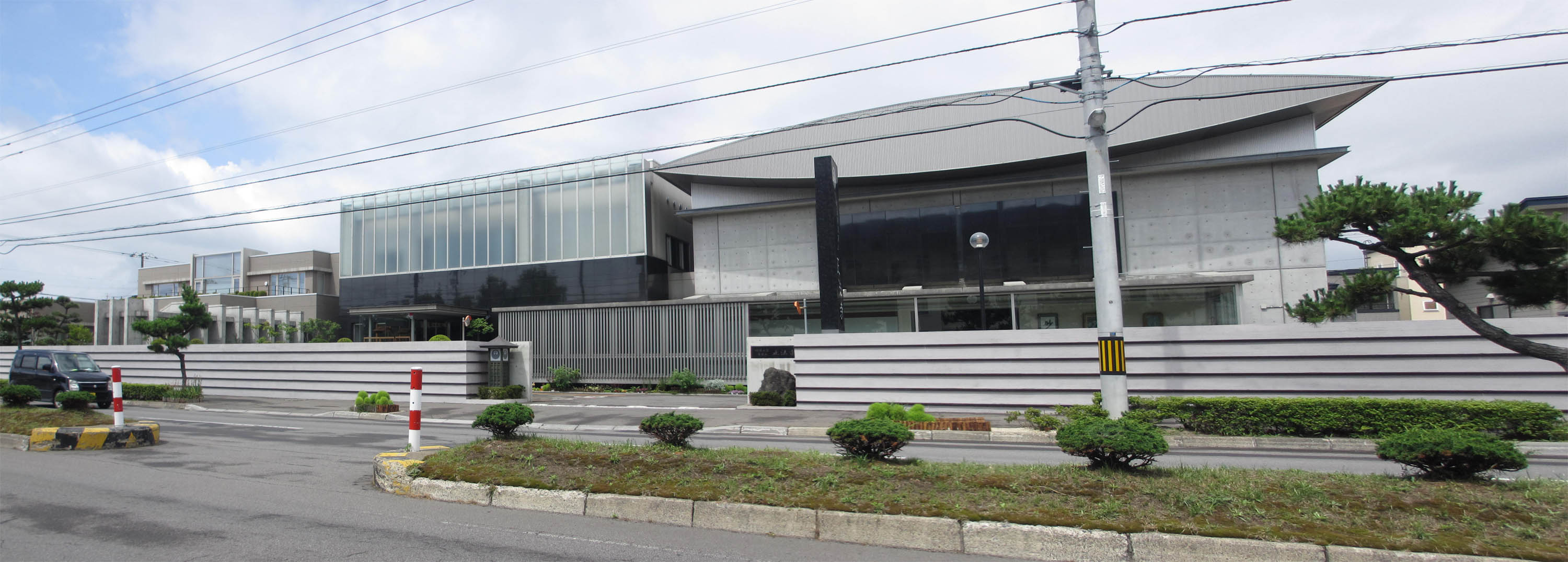 函館正法寺外観